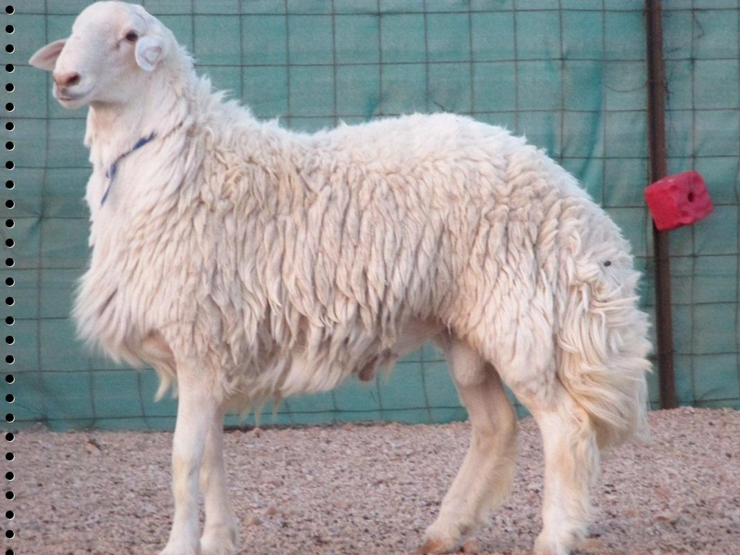 الاغنام الحرية